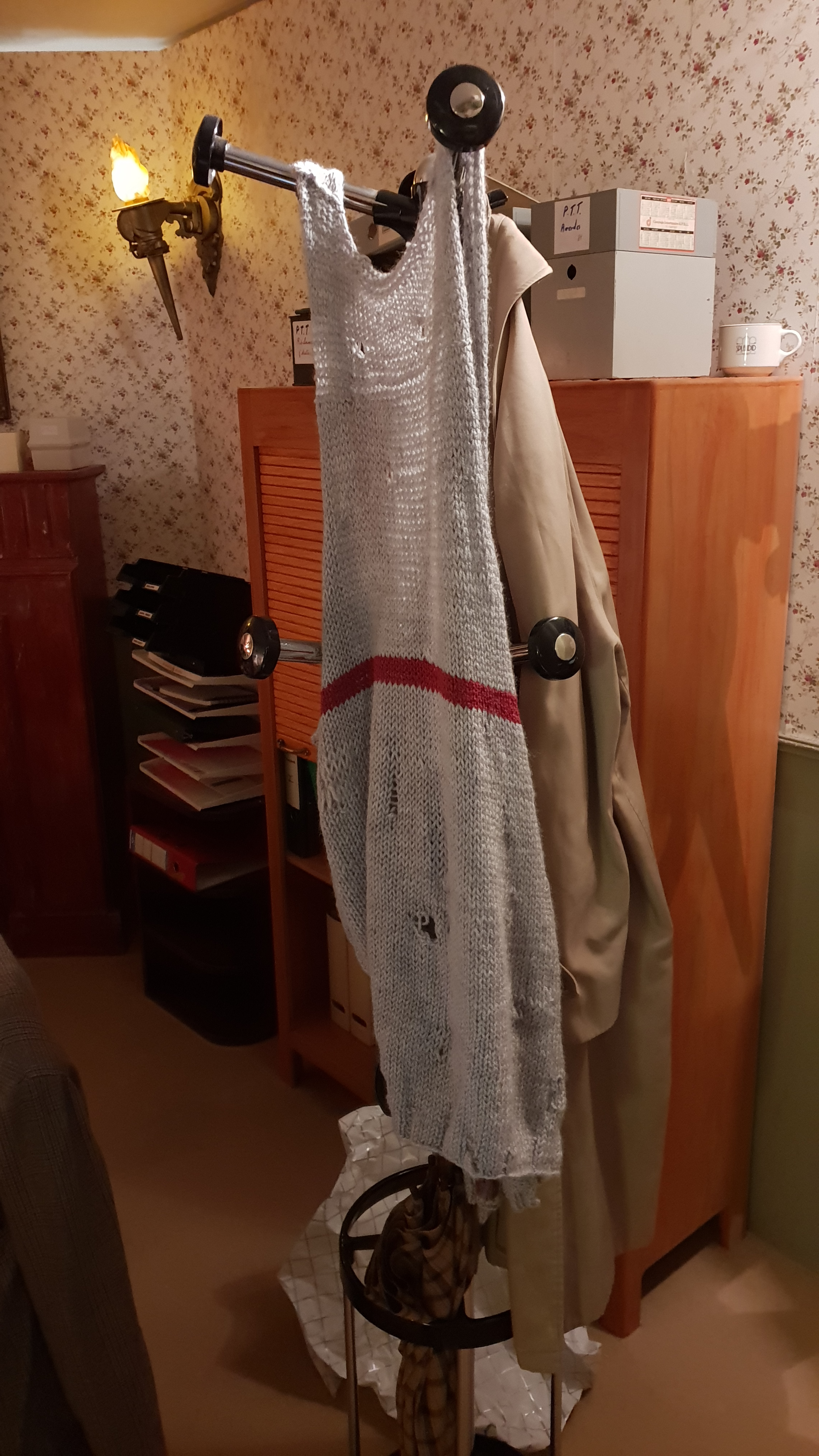 Reconstitution des décors du film Le père Noël est une ordure à l'exposition Génération 80 Experience, Liège (Belgique)